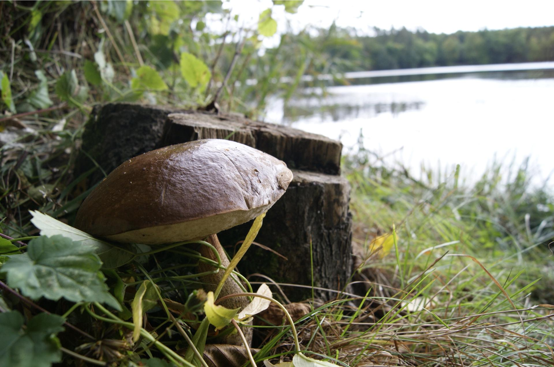 Kozak na brzegu jeziora